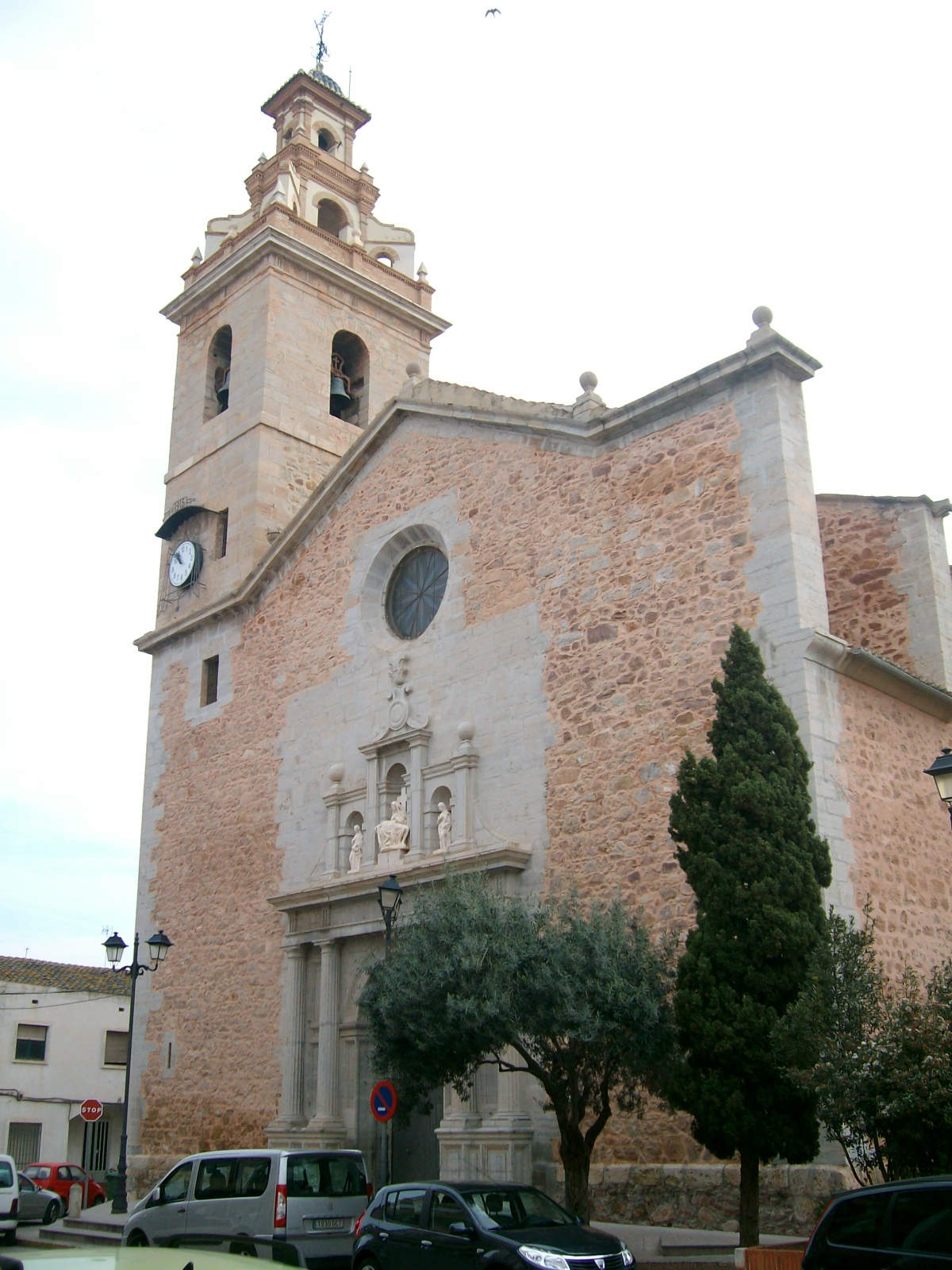 Església dels Sants Joans 13.205-001.